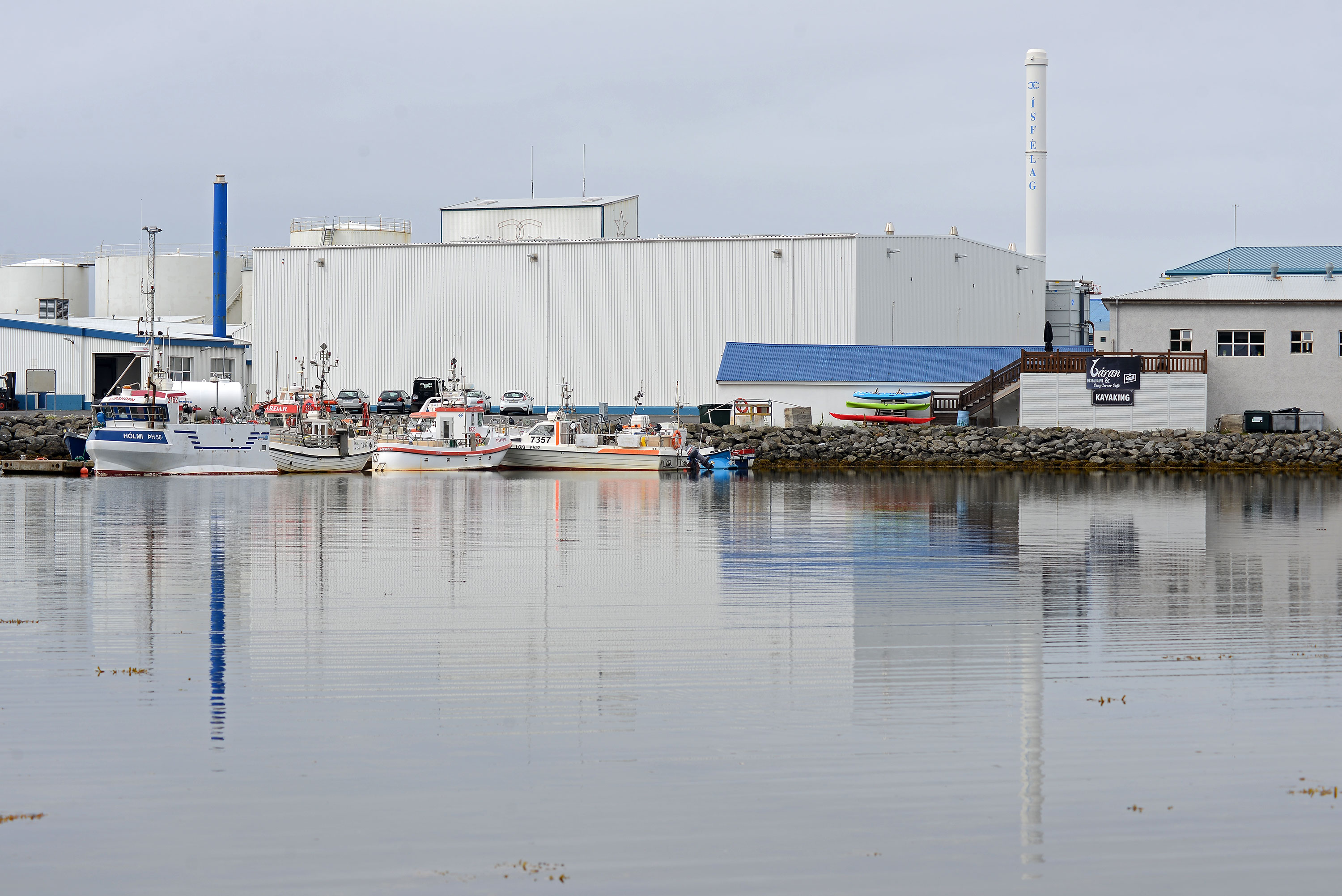 Hafen Þórshöfn mit Fischfabrik im Hintergrund